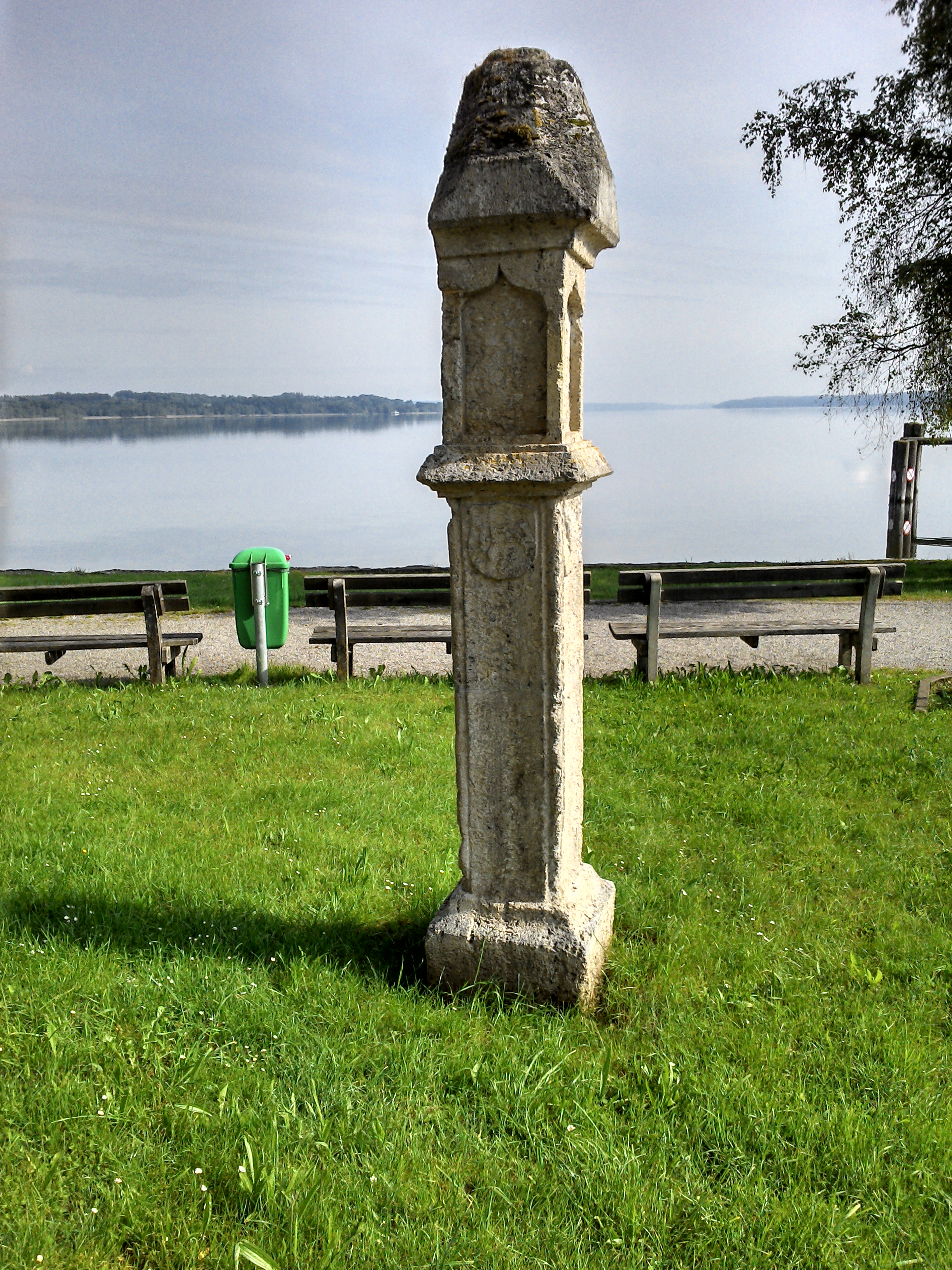 Seegerichtssäule in Seeshaupt mit der Inschrift S-G, der Jahreszahl 1522 und dem schräg gestellten Fisch, der im Seeshaupter Wappen dargestellt ist. Wahrscheinlich war sie einst eine Grenzmarkierung zwischen dem Landgericht Weilheim und dem Seegericht Starnberg.